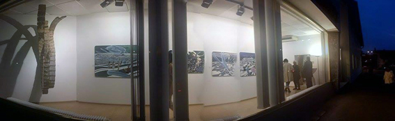 Aussenansicht der Galerie in der Schmiede zur Ausstellungseröffnung "Erfühlte Lebenswelten" von Beni Altmüller